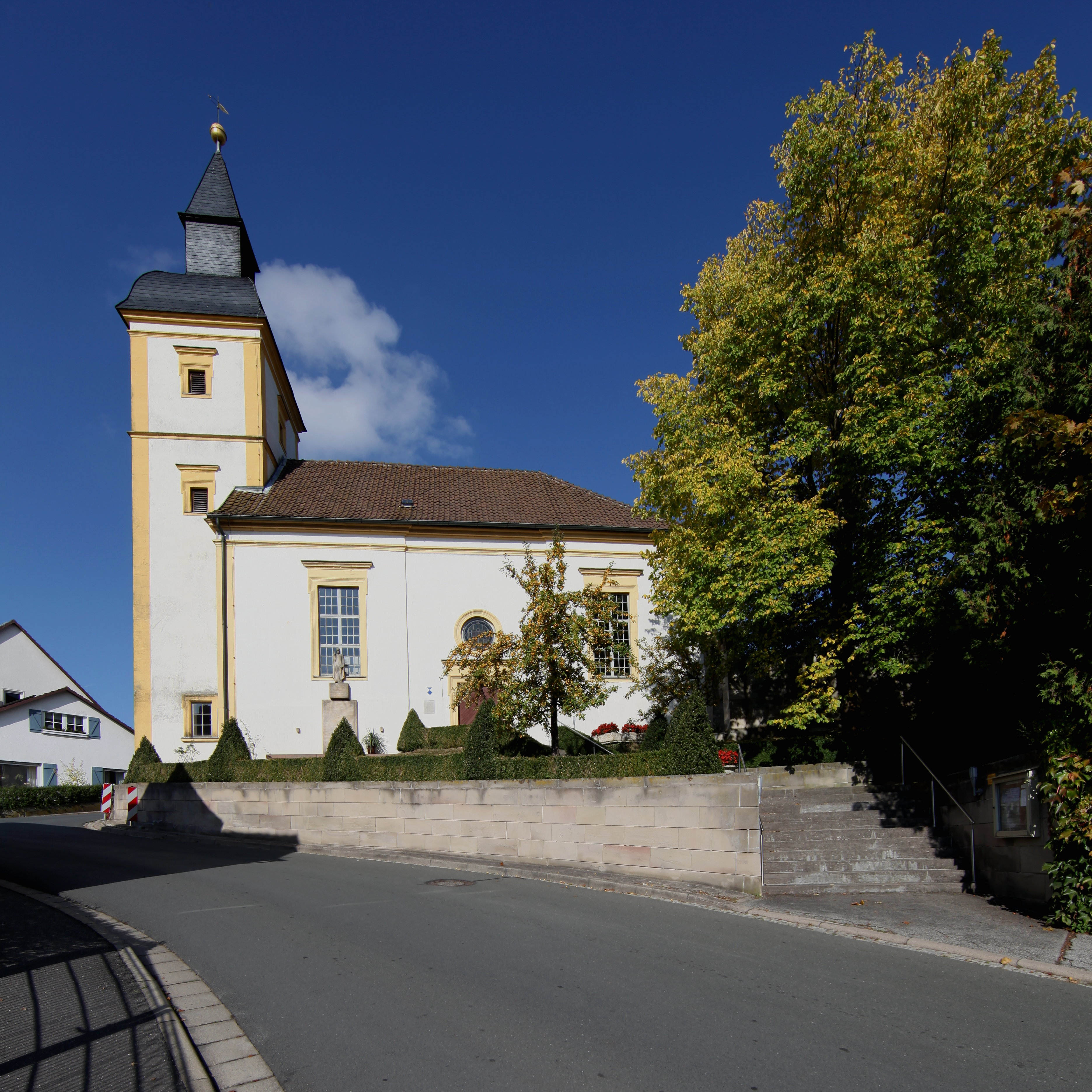 Schlosskirche in Hassenberg